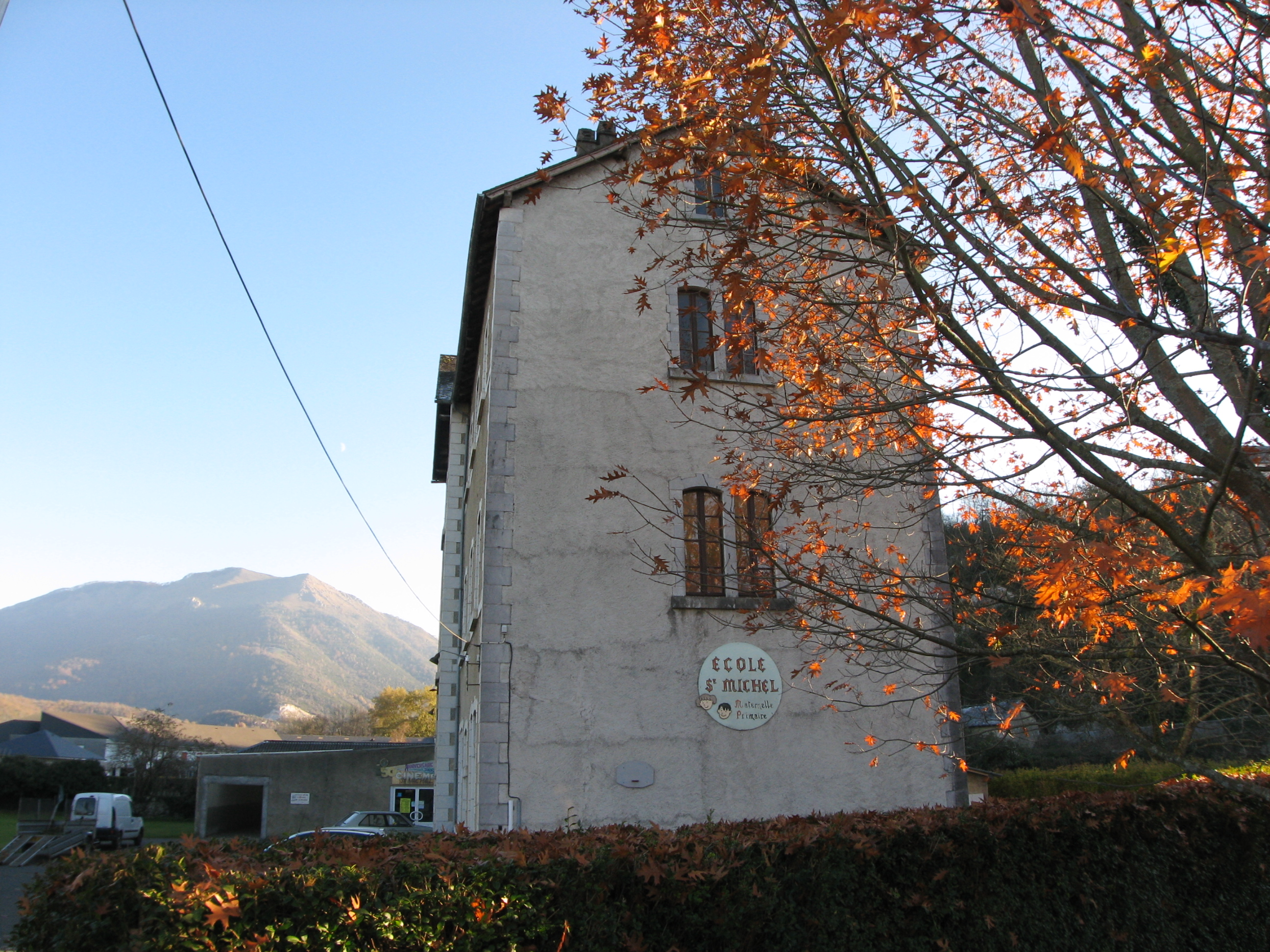 Ecole Saint Michel d'Arudy (Pyrénées-Atlantiques) (Pyrénées).